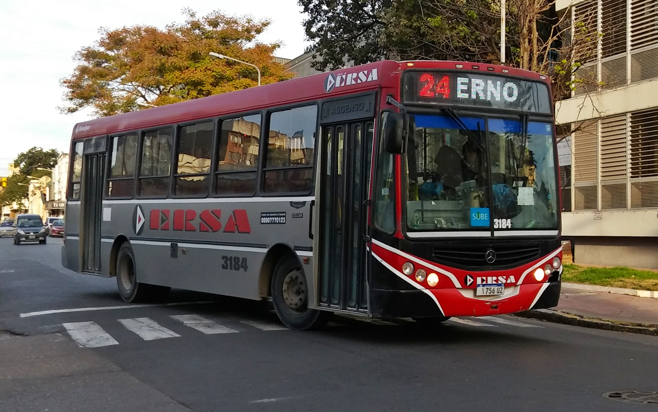 ERSA Urbano Paraná Línea 24 - Interno 3184 Metalpar Tronador II Mercedes-Benz OF1418 Captada en Laprida y Córdoba